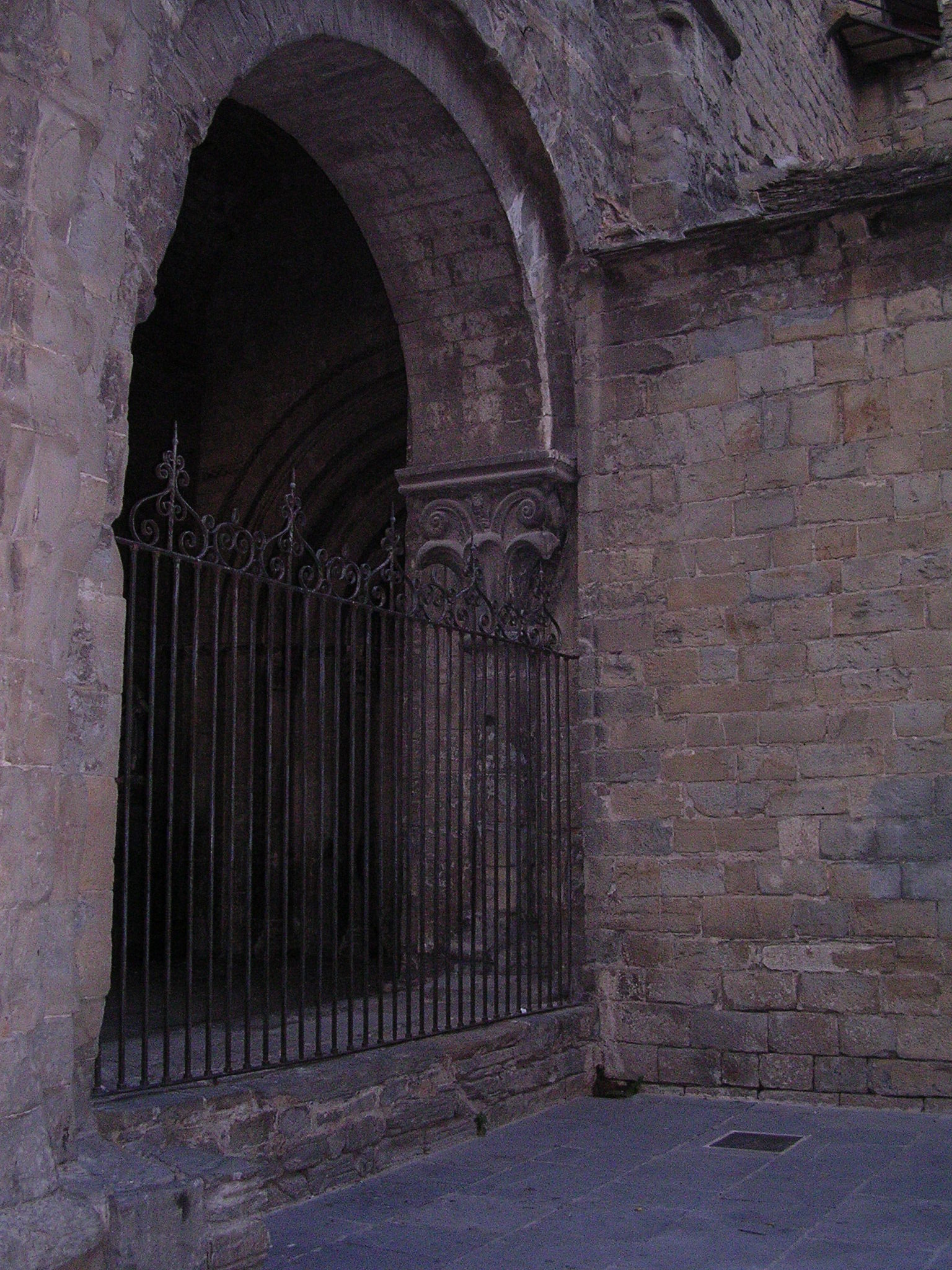 Puerta principal de la catedral de San Pedro de Jaca